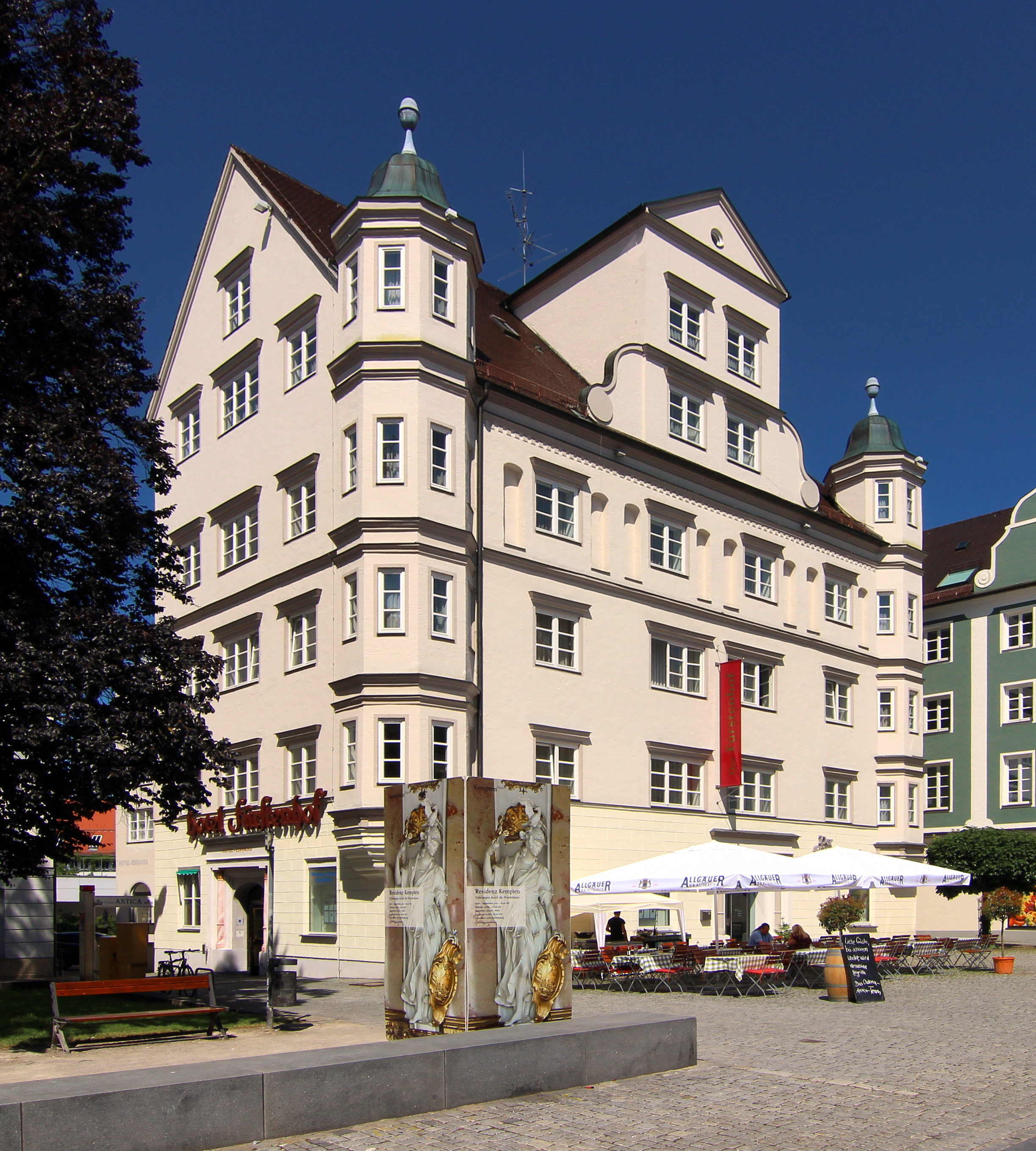 Fürstenhof, ehemals Café Schiff, Kempten